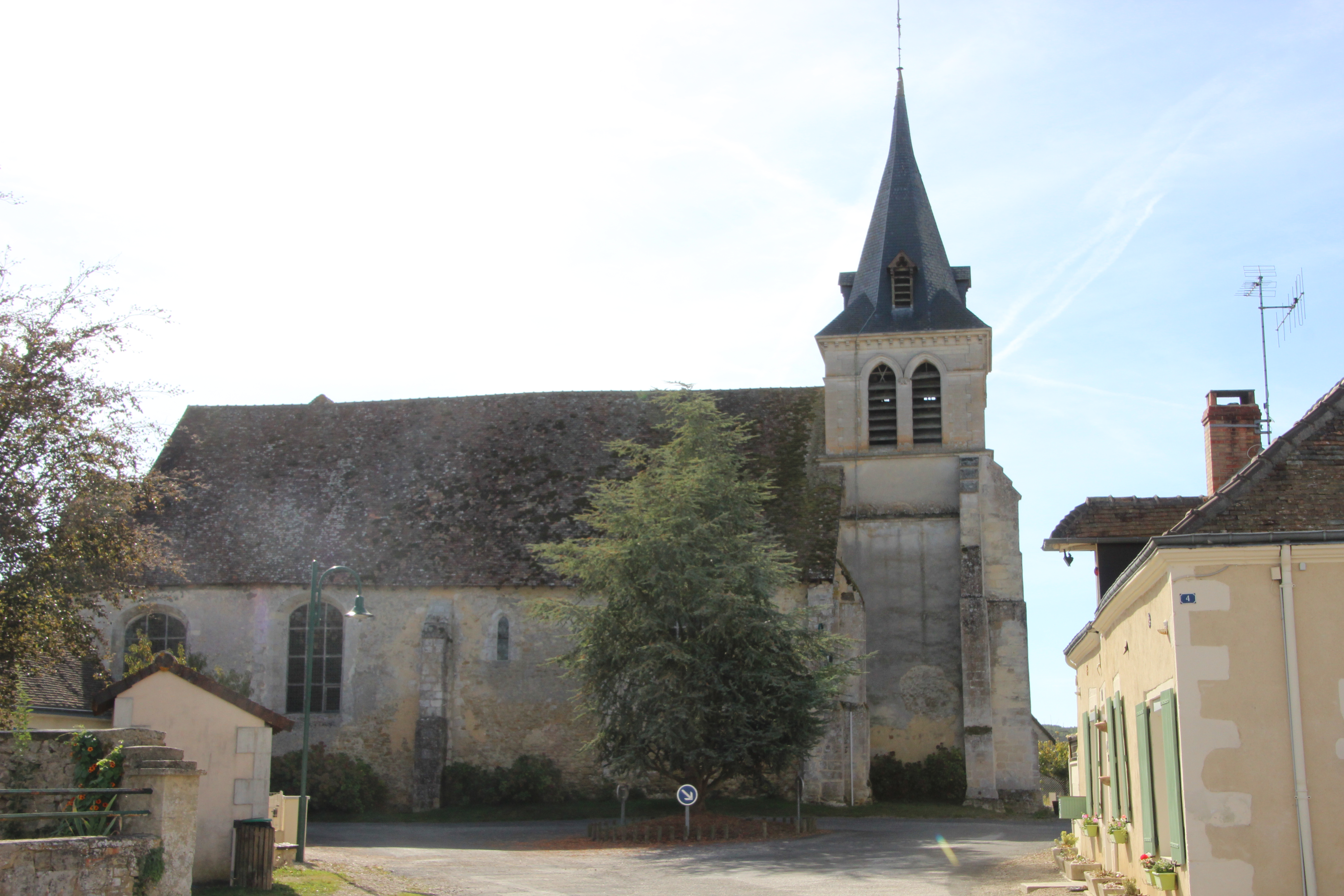 Église Saint-Pierre Saint-Paul de Moncé-en-Saosnois - wiki takes le Saosnois